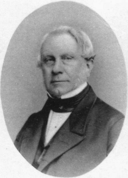 Porträtfotografie von Theodor Wagner, vor 1881.